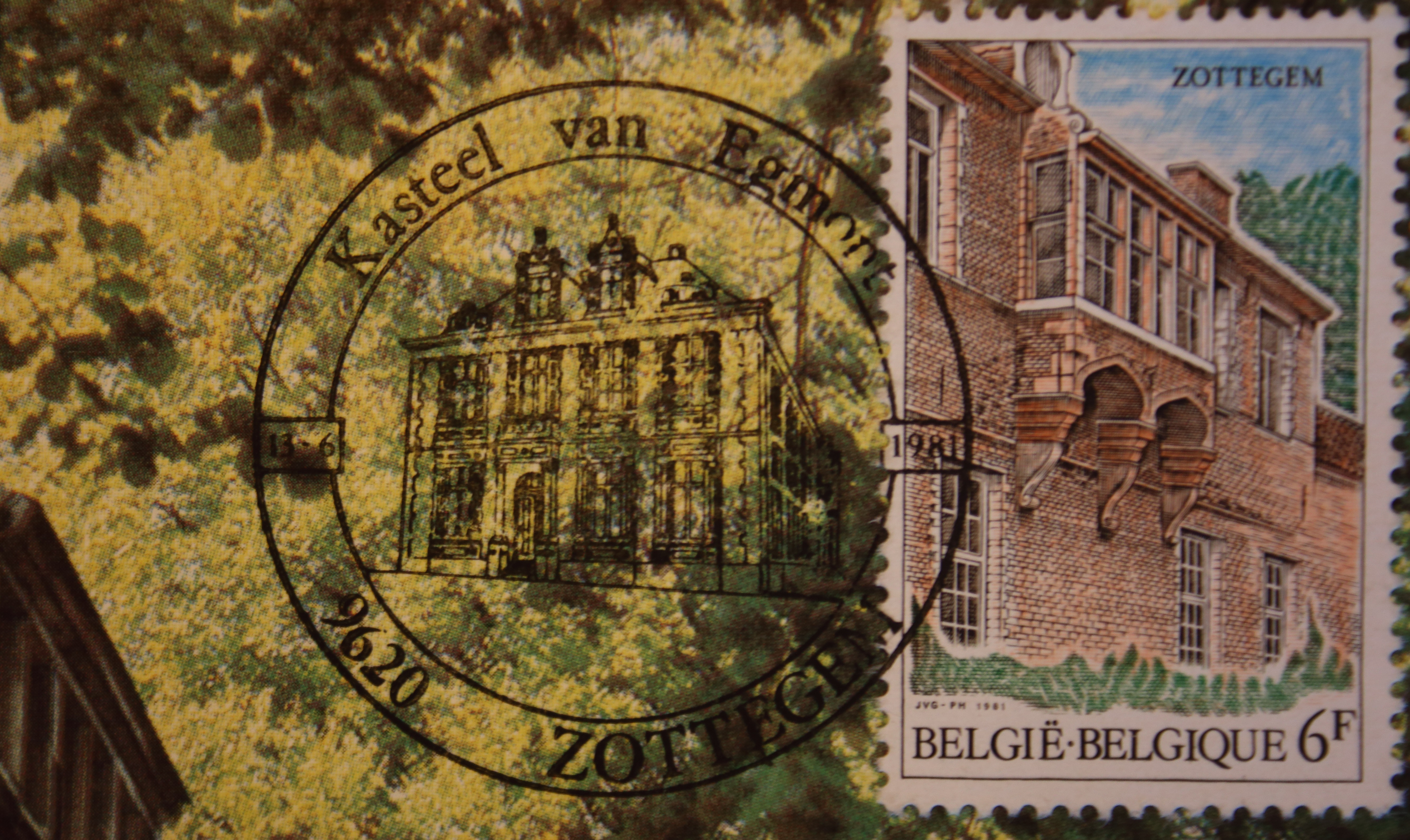 postzegel, België, 1981, Egmontkasteel Zottegem